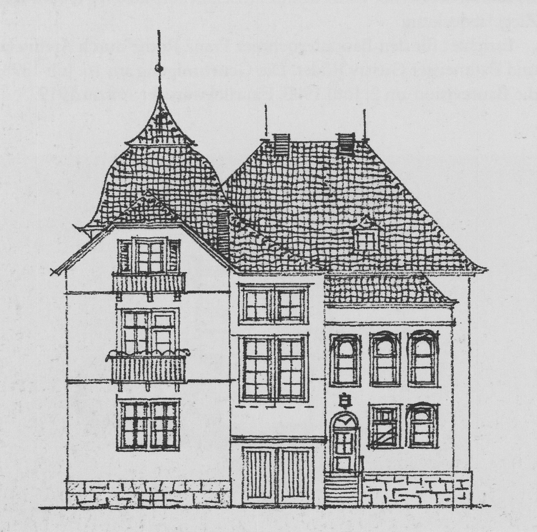 Radebeul Villa Bernhard Große Umbauzeichnung 1935